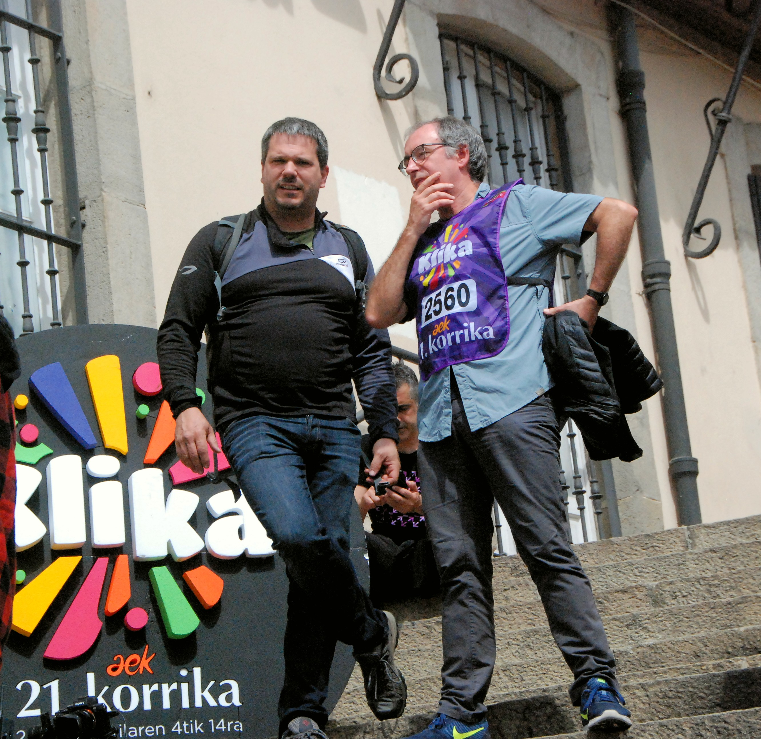 Iñaki Uria 2019ko Korrika bukatuta Gasteizen